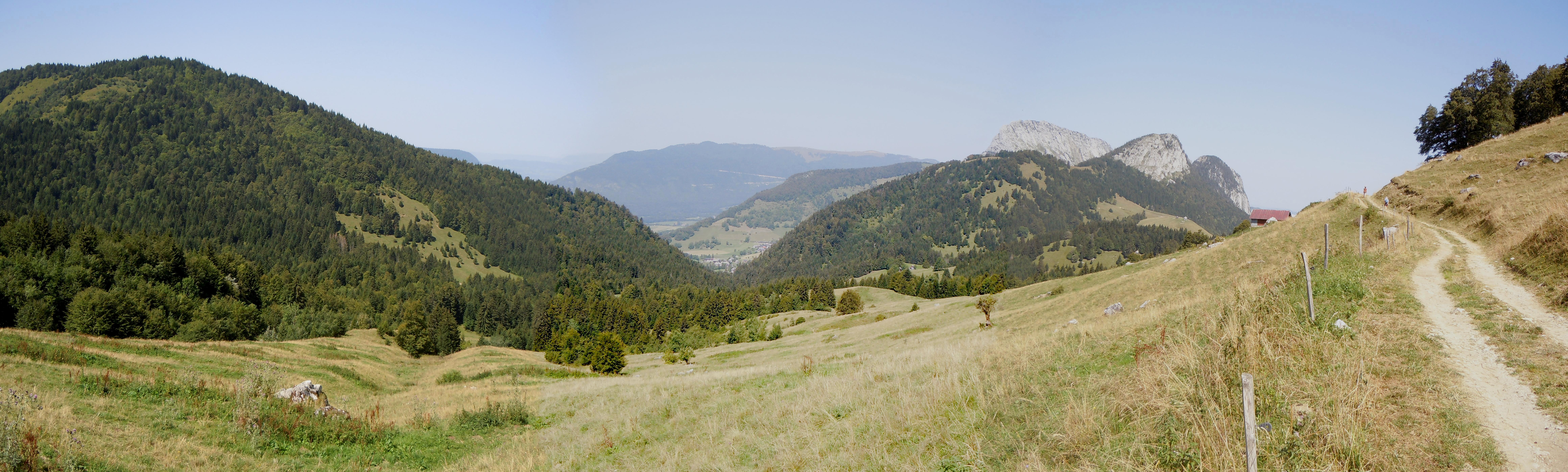 Golet de Doucy- Massif des Bauges - Savoie- Vue de la Bellecombe depuis les alpages du Golet de Doucy avec, au fond le Roc des Boeufs.